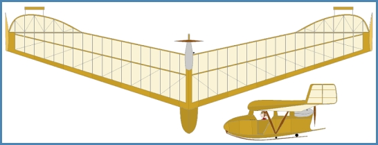 Lippisch RRG Storch5